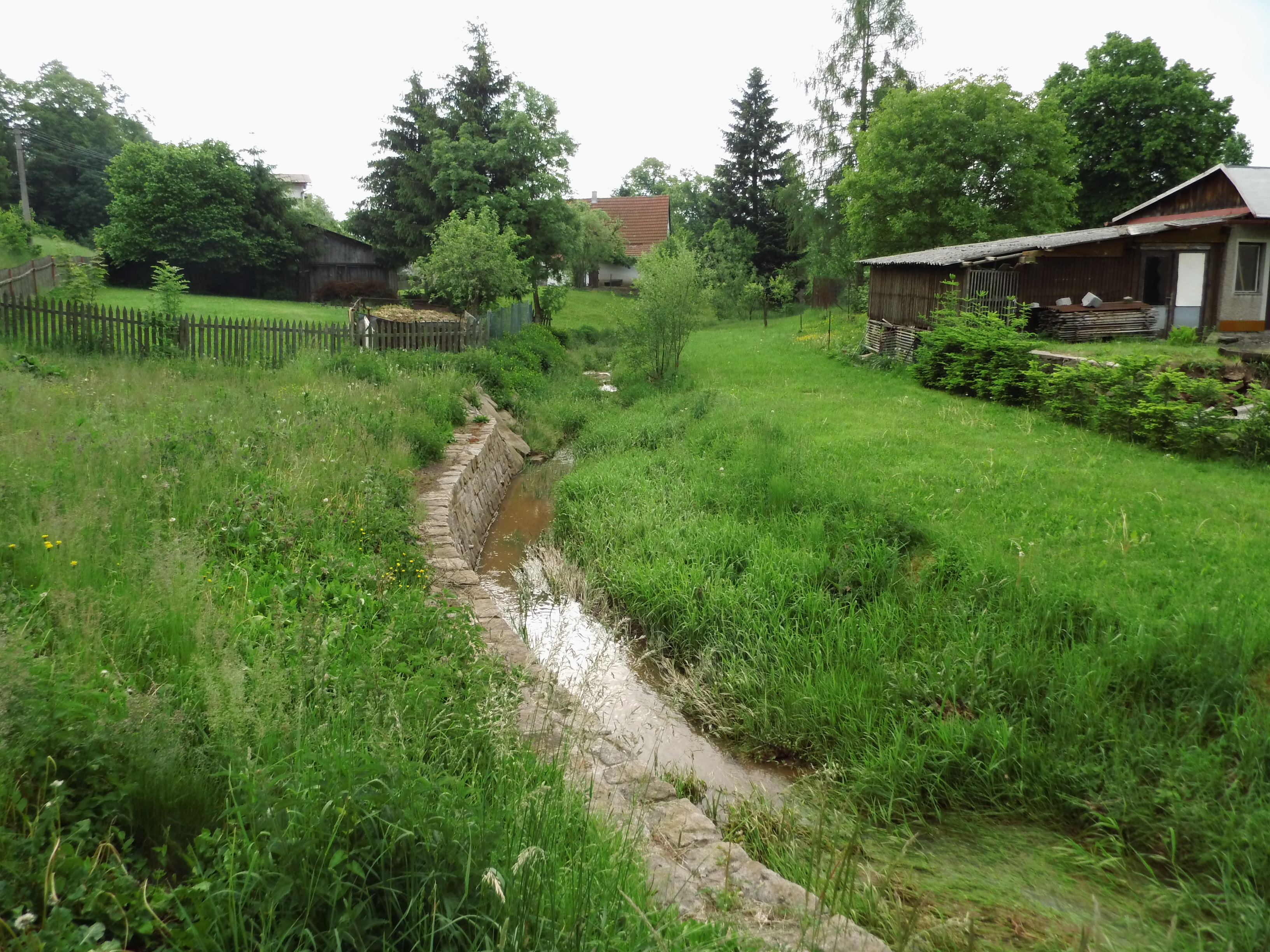 Liščí potok v Hejtmánkovicích